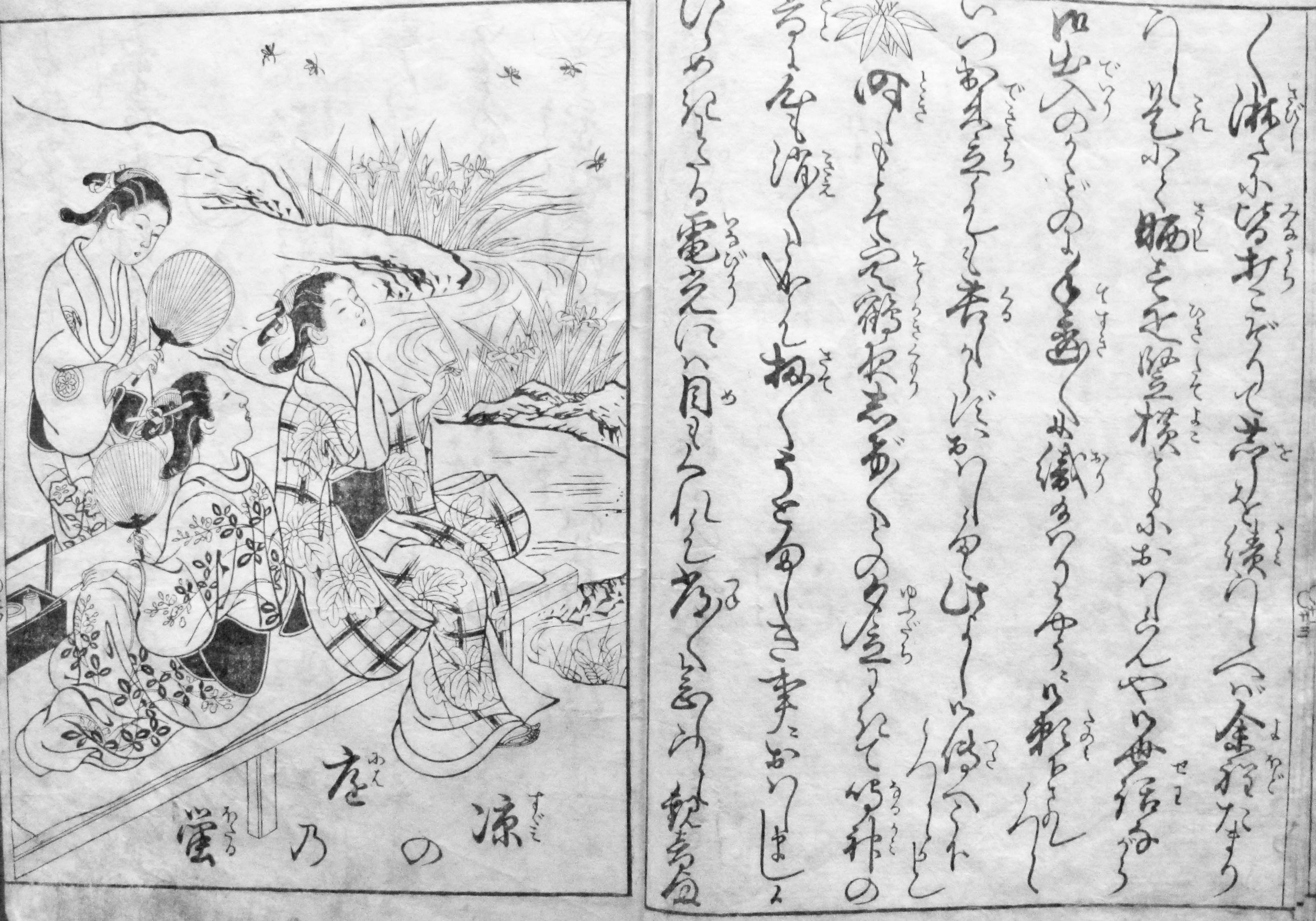 Onna many ō keiko zōshi (Manuel épistolaire pour dames). Texte : Hayashi Ranjo (?-?), illustration : Nishikawa Sukenobu (1671-1750). Japon, Kyoto et Edo (Tokyo), 1728. Impression sur papier. Musée des arts asiatiques Guimet. Paris. BG 87834. Cartel du musée : « Le texte contient des modèles de lettres à envoyer en diverses circonstances (invitations, excuses, félicitations, etc.). Chaque lettre se présente sous trois formes, distinguées par un motif végétal particulier (cerisier, érable, bambou) selon que la lettre est destinée à un supérieur, un égal ou un inférieur. »